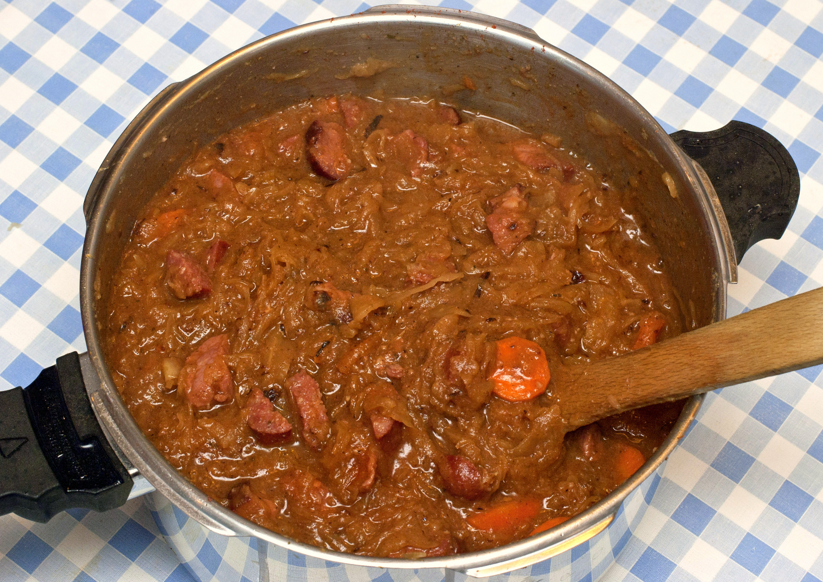 Zubereitung von Bigos: fertiger Bigos: am Besten nach mehrmaligem Aufwärmen. Wenn er leicht am Topfboden anbrennt, ist das nicht weiter schlimm.